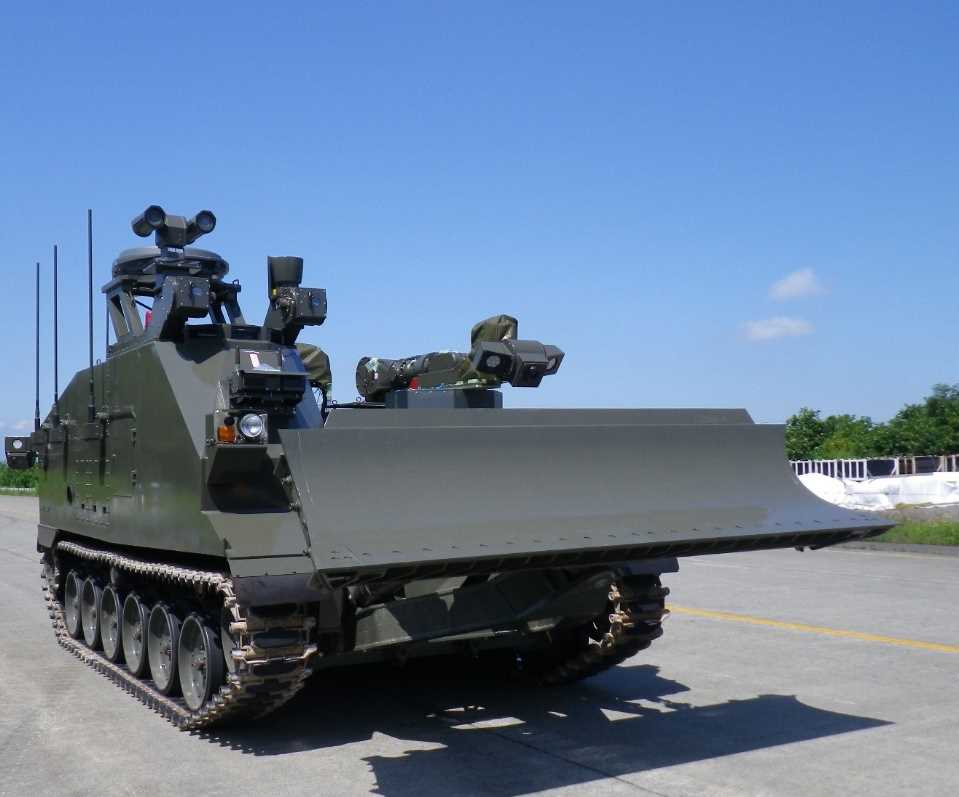 出典：「CBRN対応 遠隔操縦作業車両システムの研究」防衛装備庁ホームページ（